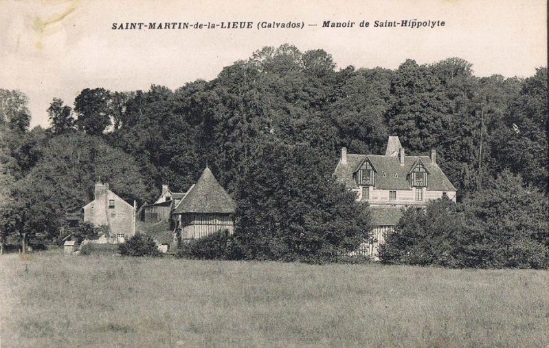 Le manoir Saint-Hippolyte à Saint-Martin-de-la-Lieue, département du Calvados, sur une carte postale de la fin du 19e ou du début du 20e siècle. Façade principale, vue de Est.